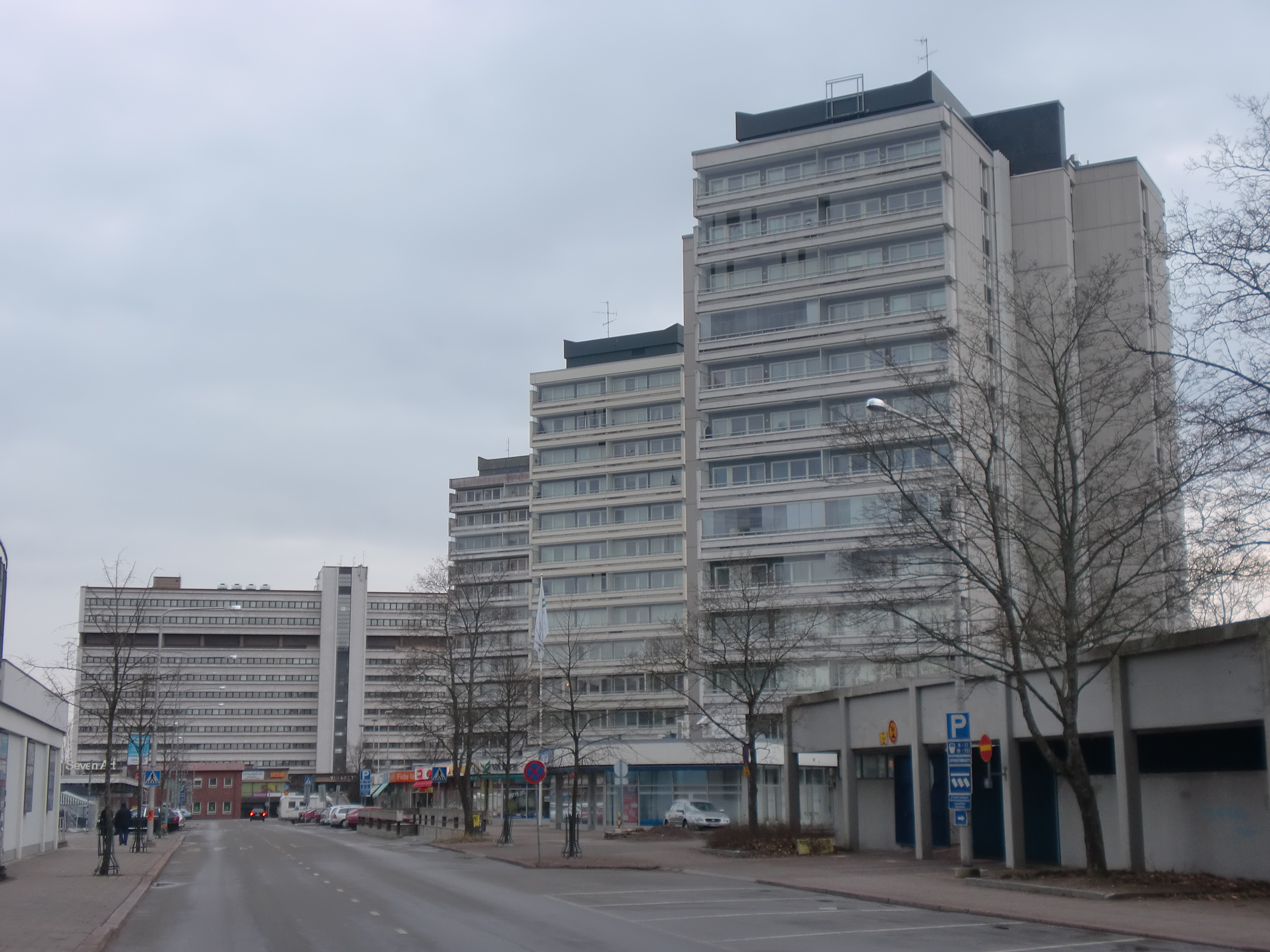 Kouvolan hallintokeskus; hallintokeskuksen kulttuuriympäristö Kouvolassa